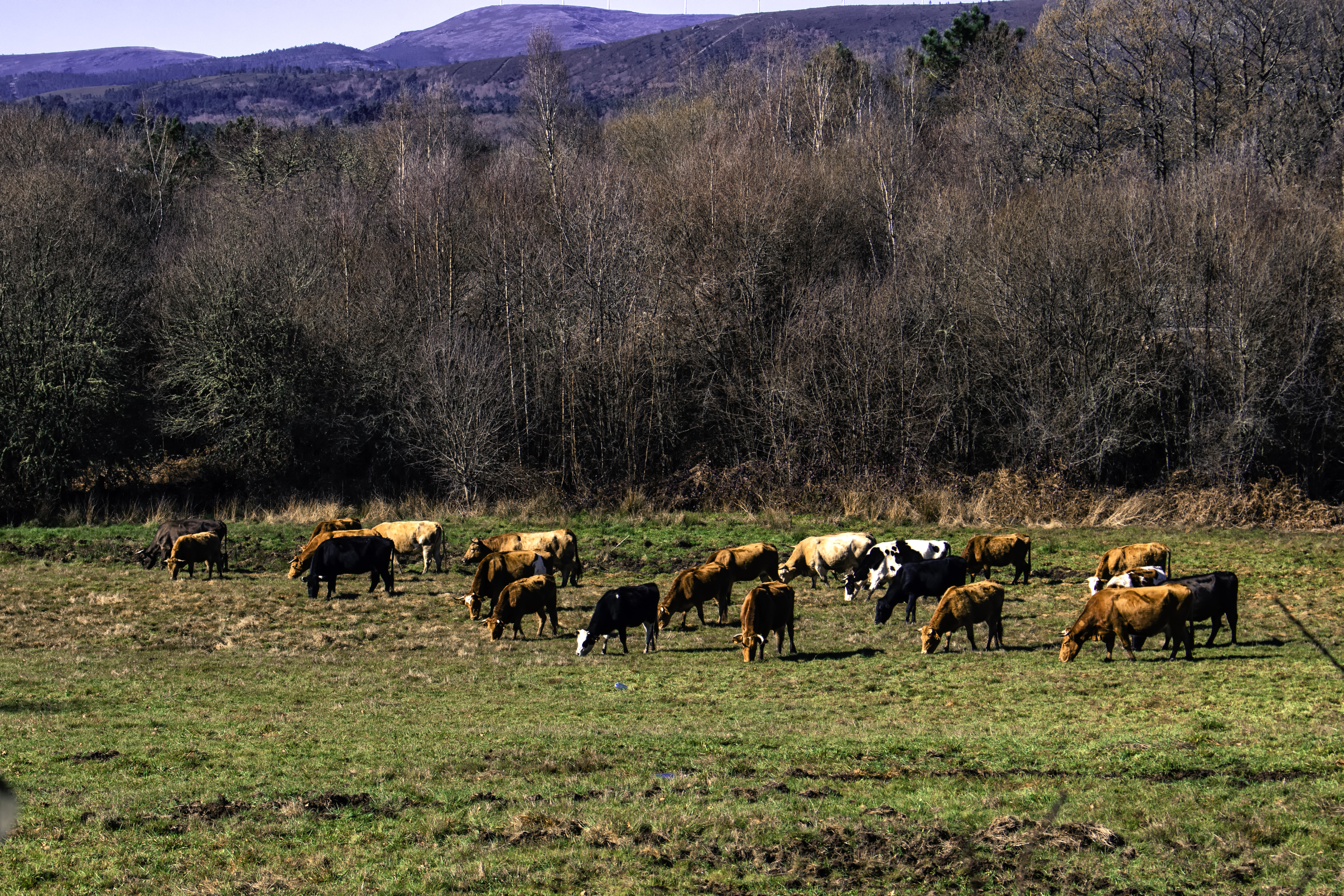 Vacas en Dadín, O Irixo.